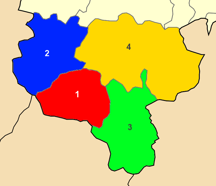 Χάρτης των ενοτήτων (και πρώην δήμων) από τις οποίες αποτελείται ο Δήμος Φαρσάλων